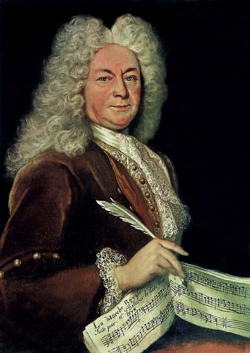 Portrait d'André Danican Philidor, dit "l’aîné" ou "père" (c. 1647-1730), compositeur et musicien de Louis XIV, Ordinaire de la Musique du Roi, copiste et bibliothécaire du monarque.